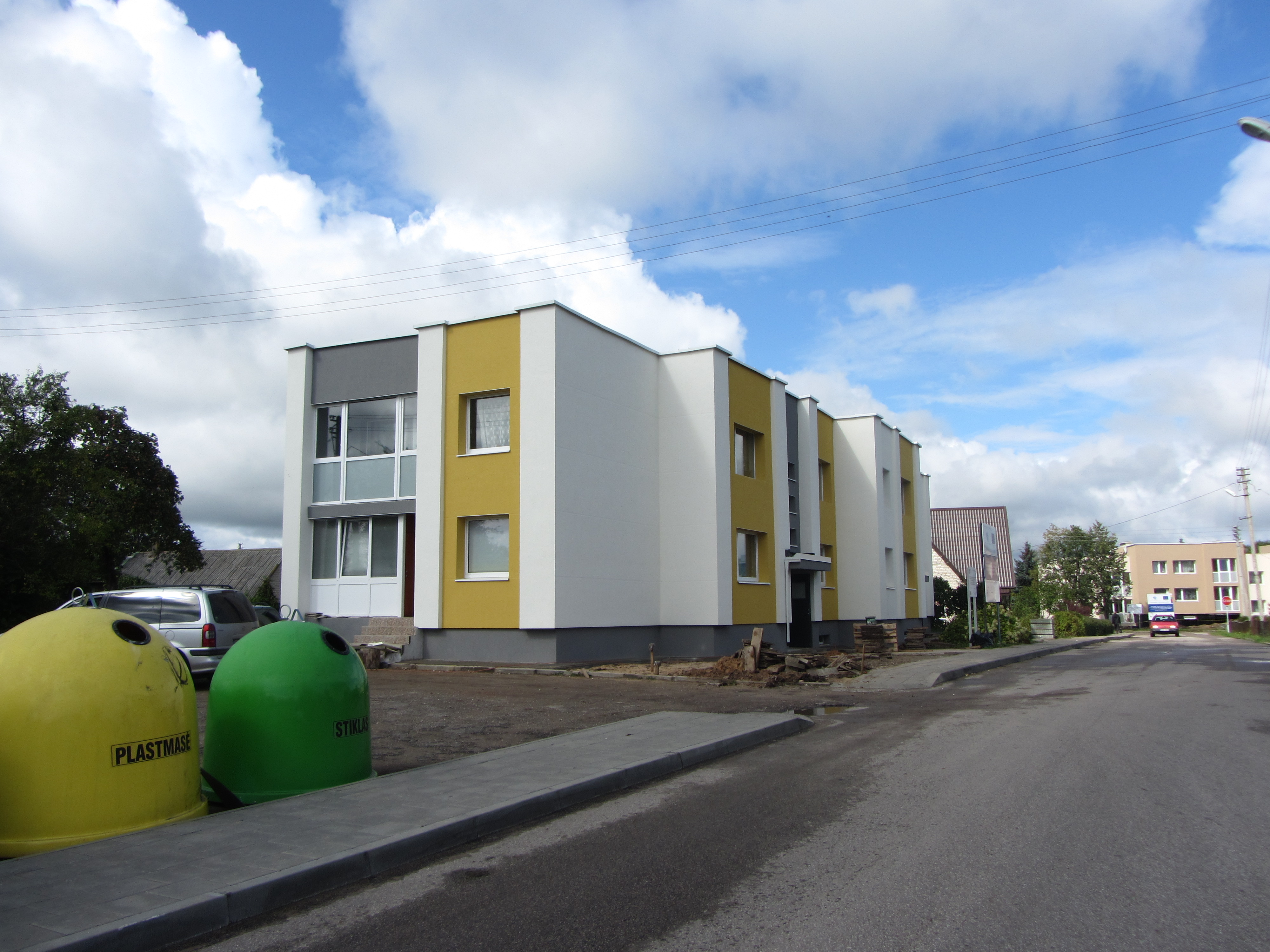 Dūkštas, Lithuania